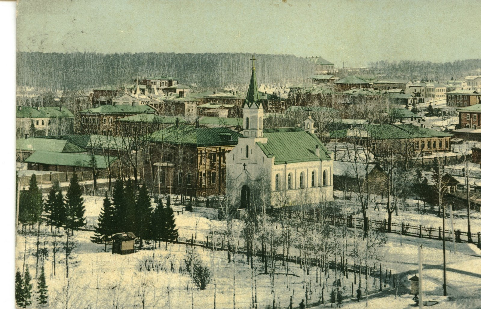 Лютеранская церковь в Томске